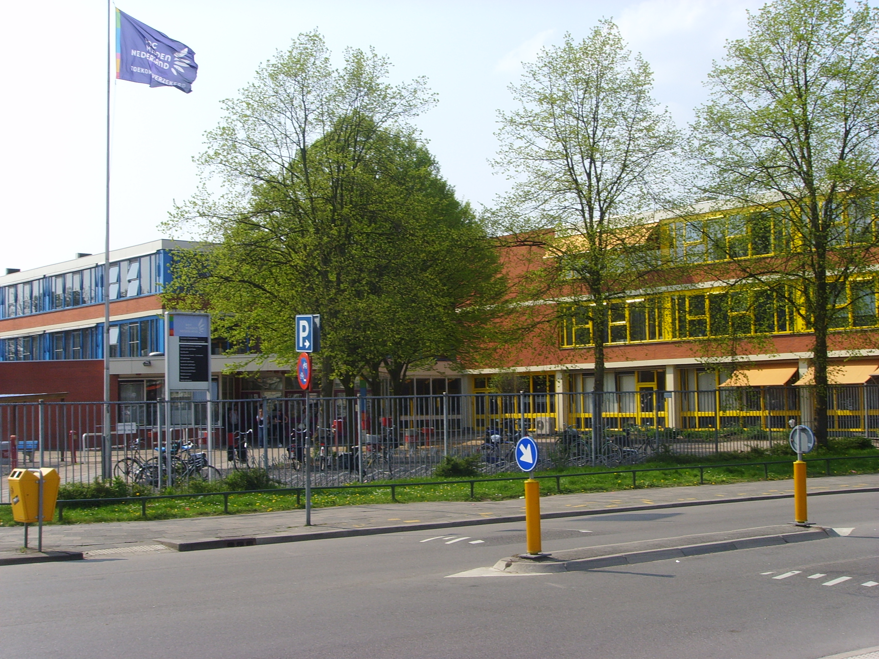 ROC Midden Nederland, previously Niels Stensen Lyceum, Utrecht (NL)